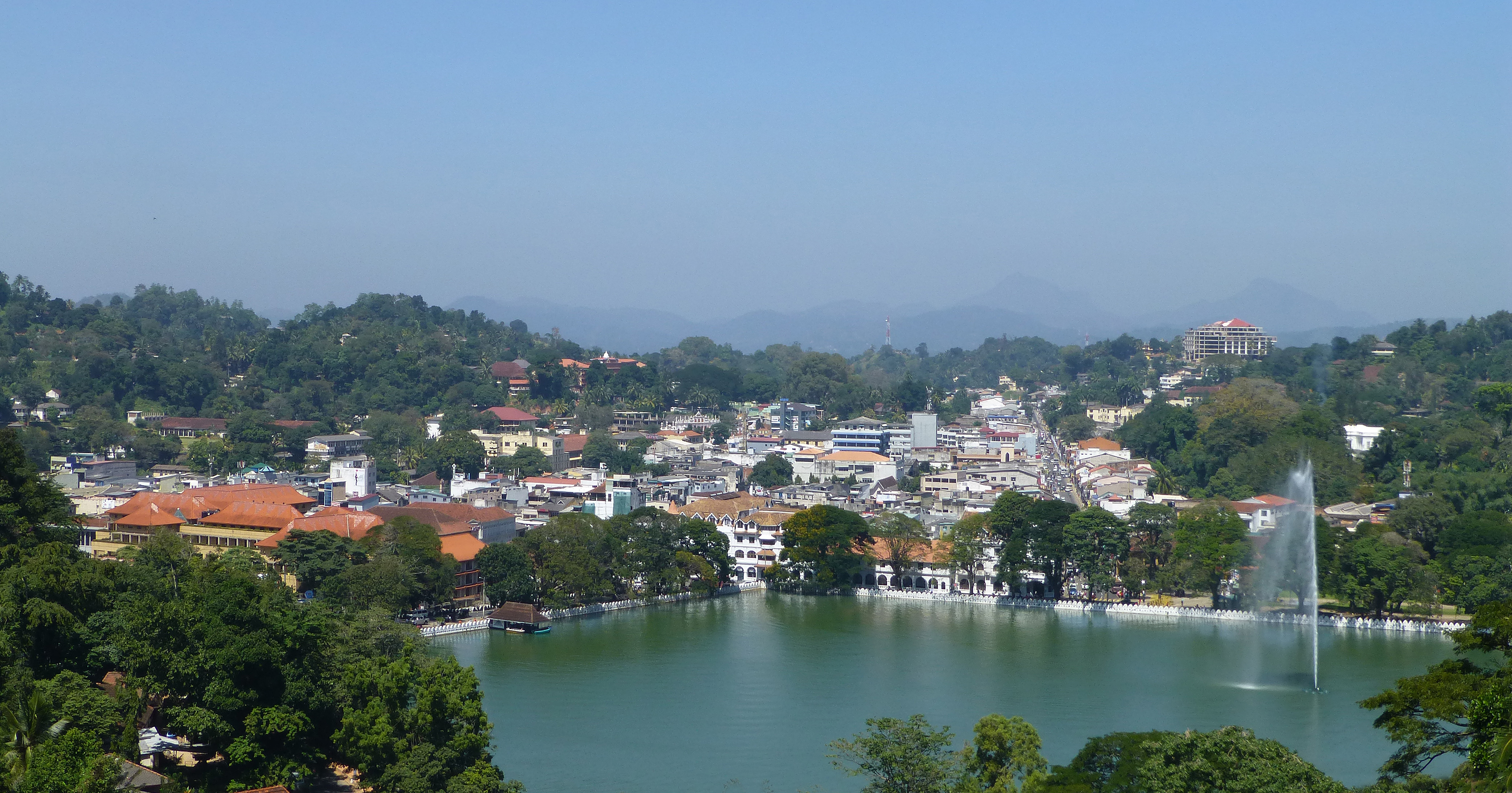 Lac de Kandy (Sri Lanka)